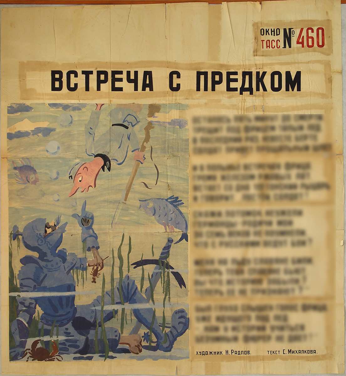 Окно ТАСС №460. Встреча с предком. Несвободный текст Сергея Михалкова (1913—2009) был размыт.